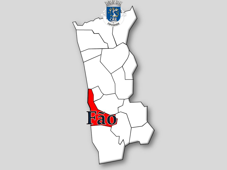 Censos 1864/2011